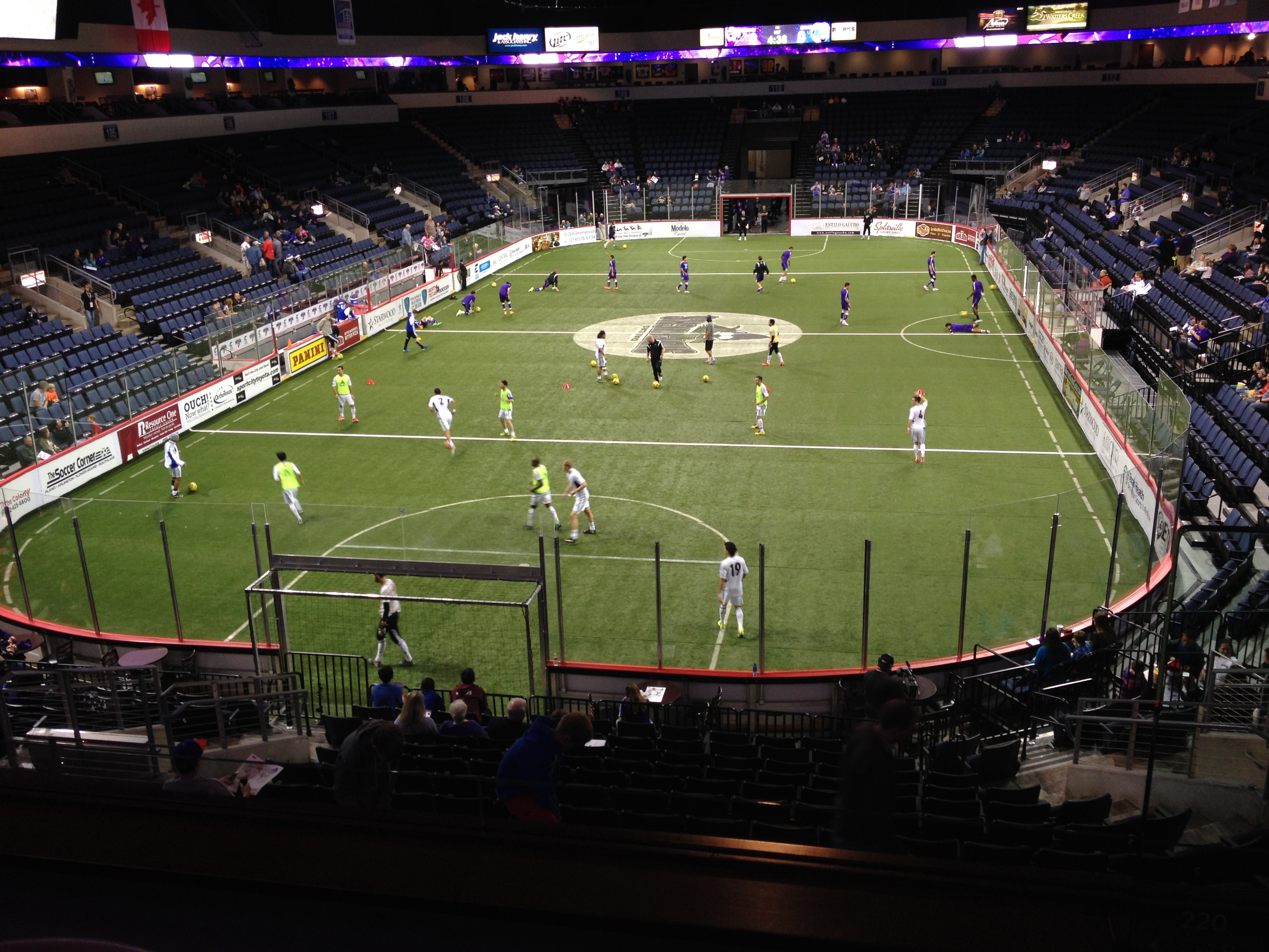 MASL Tulsa Revolution